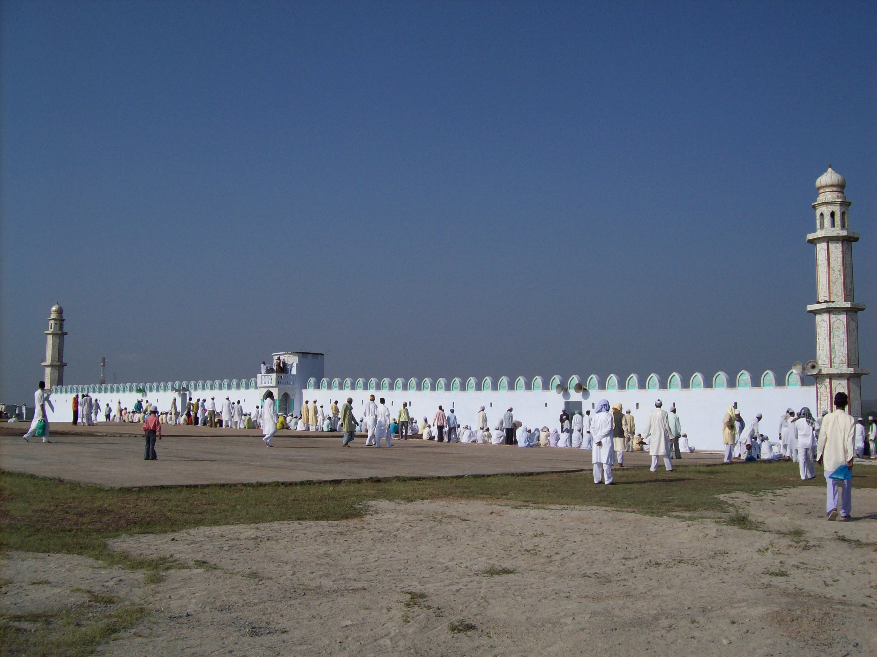 Eid Gaah Mahoba